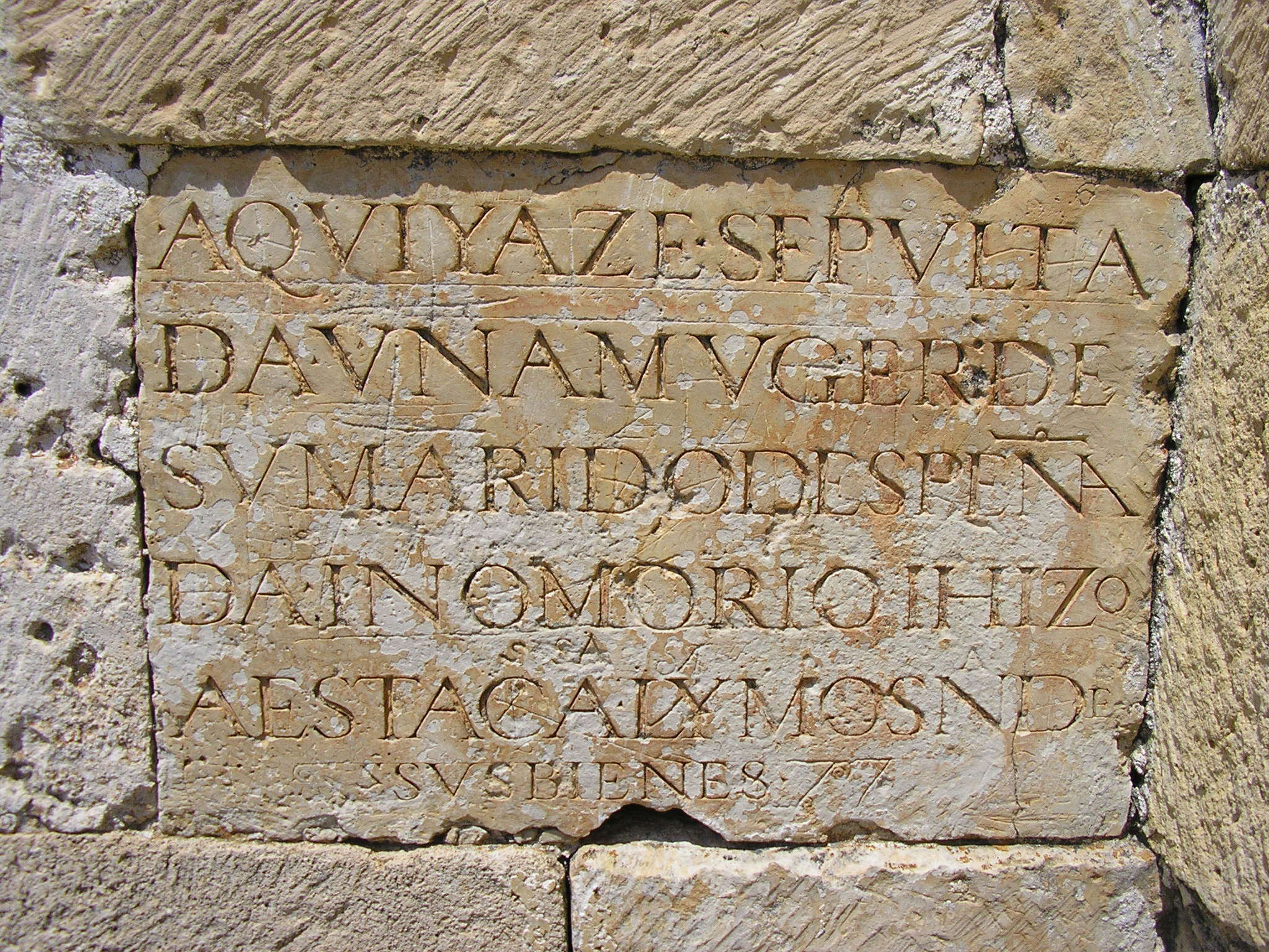 Ermita de San Frutos - Inscripcion